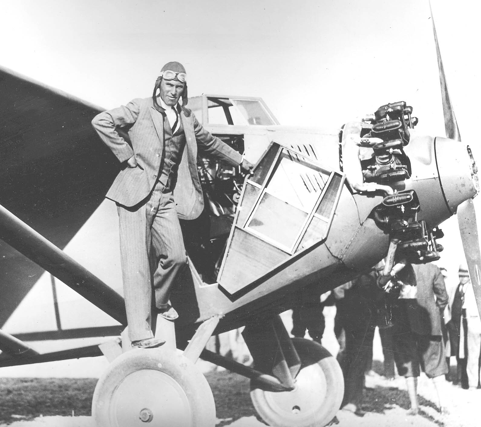 ArtGoebelandplane